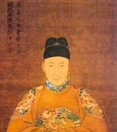 Ming Wuzong